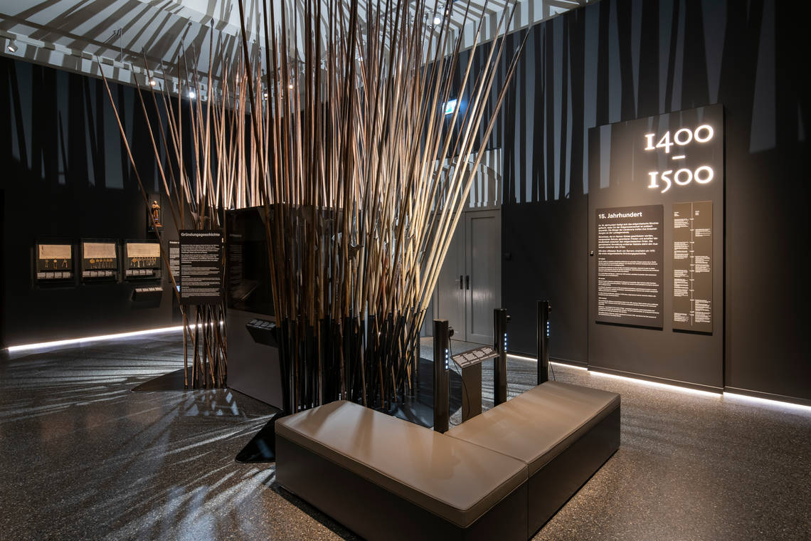 Aperçu de l'exposition permanente " Histoire de la Suisse " au musée national suisse.